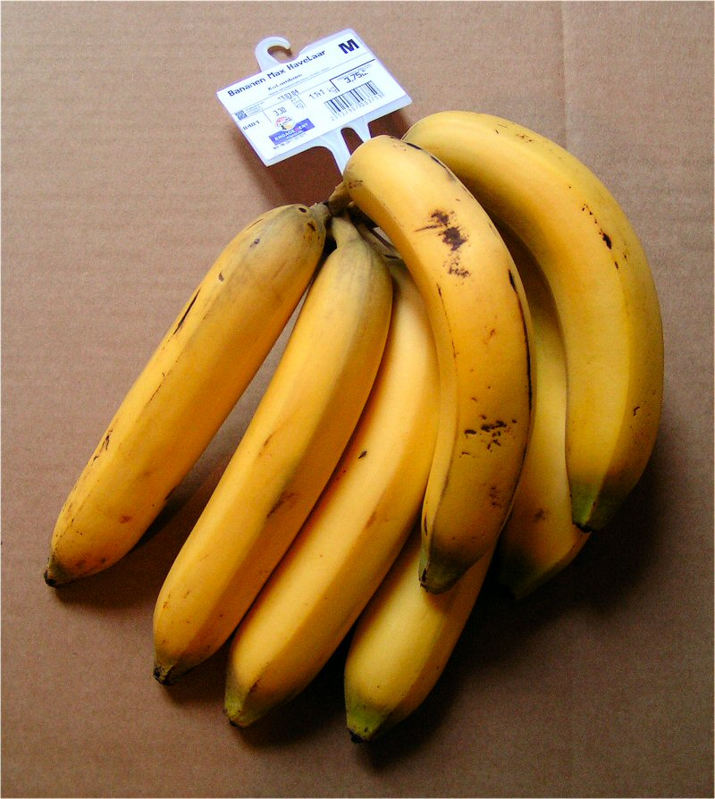 Bananen mit Zertifizierung durch die Max Havelaar-Stiftung